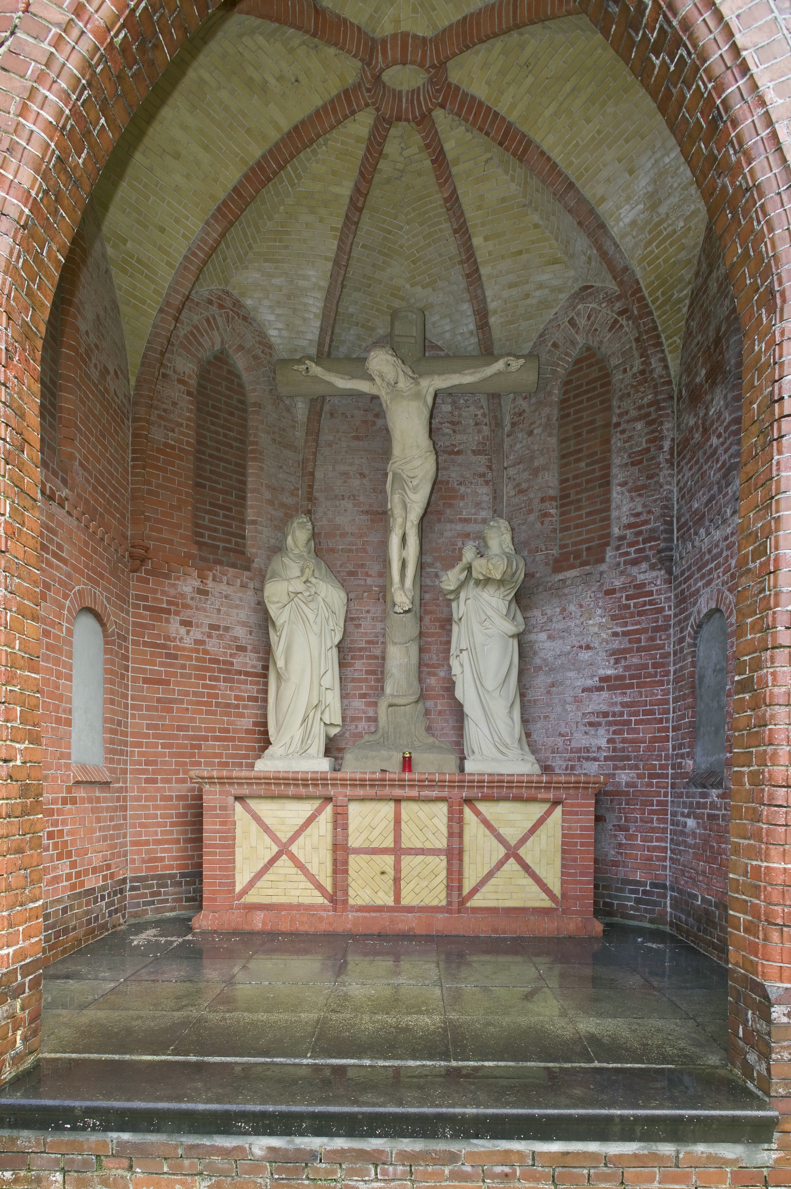 Begraafplaats - Kerkhofkapel: Zicht op het altaar met beeldengroep, voorstellende Jezus aan het kruis en Maria en Johannes